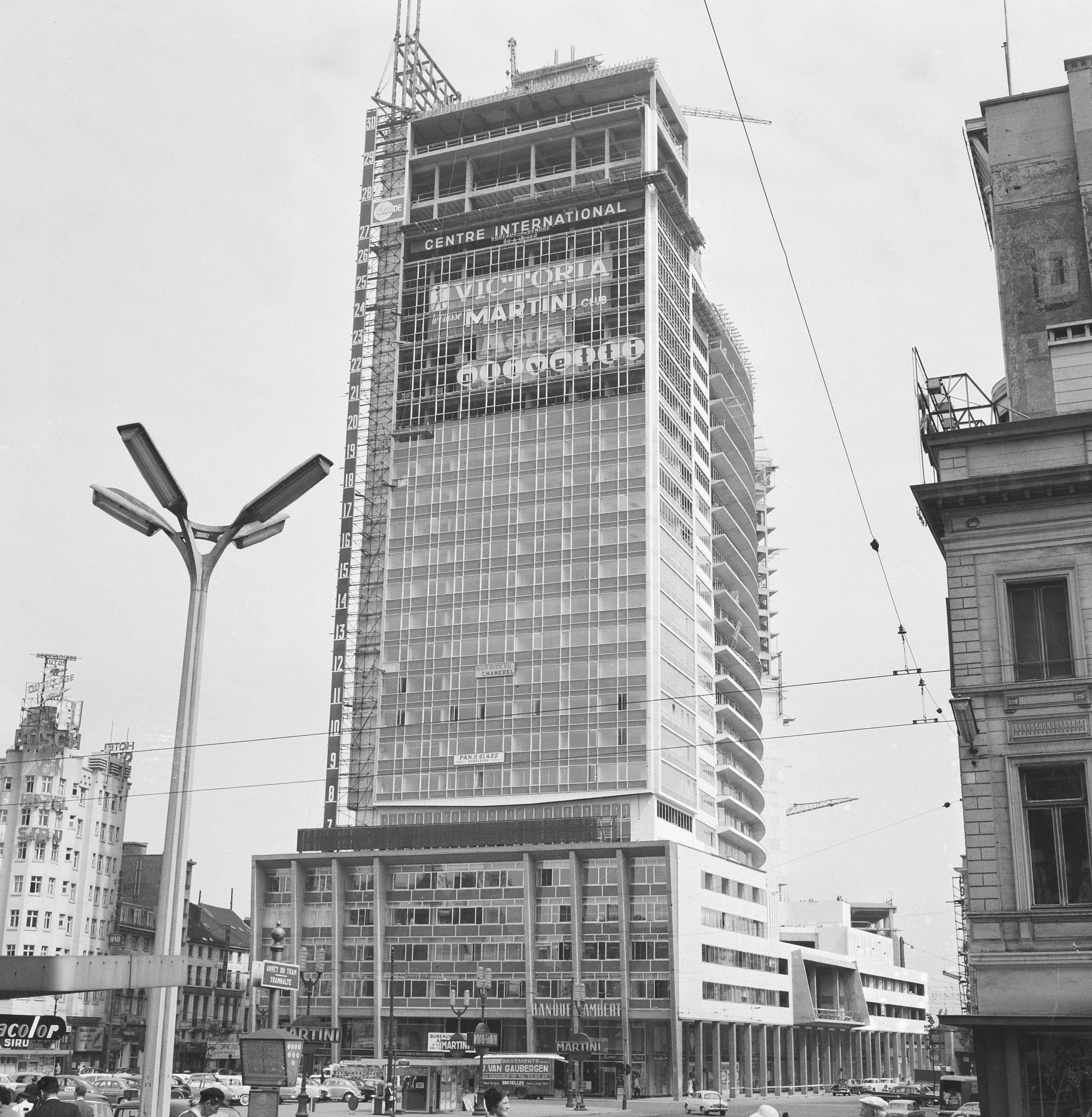 Collectie / Archief : Fotocollectie Anefo Reportage / Serie : [ onbekend ] Beschrijving : Wolkenkrabber te Brussel Datum : 18 maart 1963 Locatie : Brussel Trefwoorden : wolkenkrabbers Fotograaf : Pot, Harry / Anefo Auteursrechthebbende : Nationaal Archief Materiaalsoort : Negatief (zwart/wit) Nummer archiefinventaris : bekijk toegang 2.24.01.03 Bestanddeelnummer : 914-9436